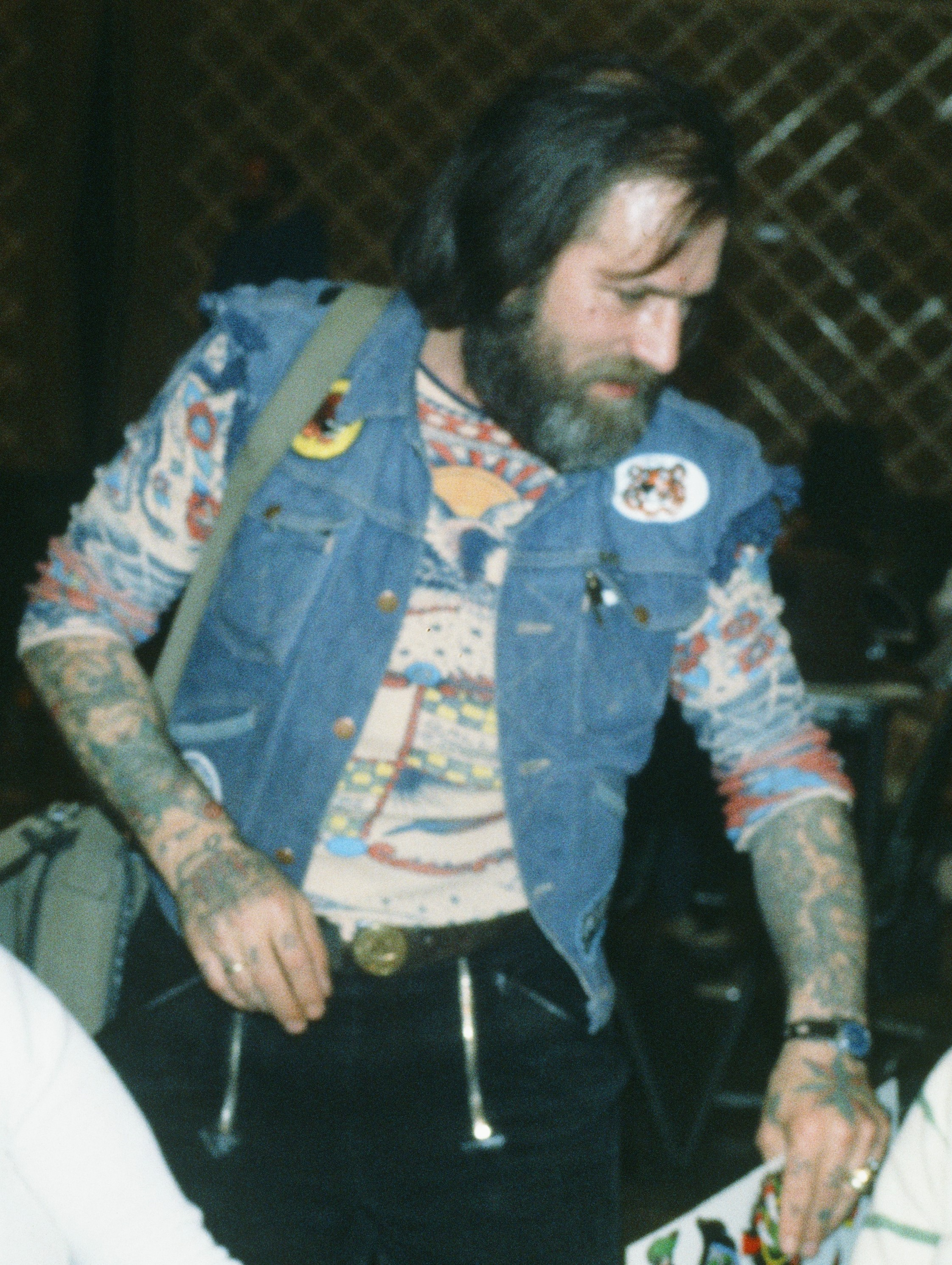 Theodor Vetter (Tattoo-Theo) auf der Amsterdam Tattoo Convention 1979. Er trägt ein "Lyle Tuttle -T-Shirt von 1973.